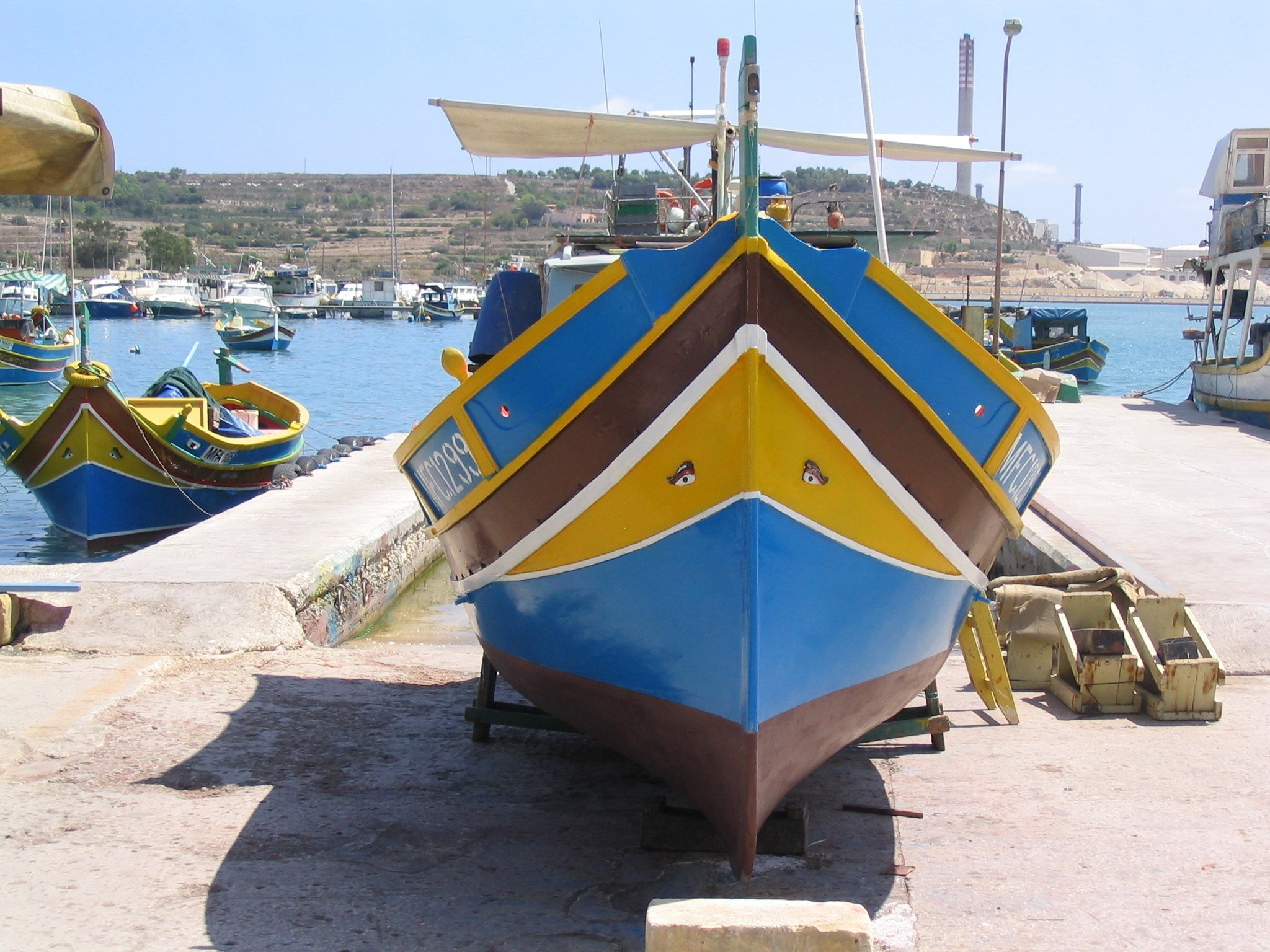 maltesisches Fischerboot mit Augen in Marsaxlokk